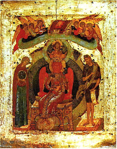 Icon of Sophia - Holy Wisdom / София - Премудрость Божия В ветхозаветных книгах София - олицетворение высшей мудрости и творческой любви Бога, Его мироустрояющая воля, источник бытия и орудие творения. Христианская традиция, начиная с апостольских времен, отождествляет Софию с вторым лицом Св. Троицы, Сыном Божиим Иисусом Христом (Кор I, 24). В византийском и древнерусском искусстве известны изображения Софии в виде аллегорической фигуры - как самостоятельные, так и в составесложных символических композиций. Позднесредневековая традиция (начиная с XVII в.) нередко сближает Софию с Богоматерью. Отождествление Софии с Сыном-Логосом близко иконографии Иисуса Христа - Ангела Великого Совета. На рассматриваемой иконе София персонифицируется антропоморфной фигурой - огнеликой крылатой девой-ангелом. София восседает на троне в царских одеждах, на голове у Нее корона. Над Ней огрудное изображение Иисуса Христа. Еще выше - Этимасия с ангелами. Премудрости предстоят, образуя деисусную композицию, Богородица и Иоанн Предтеча.